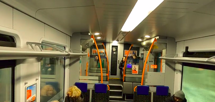 A l'intérieur d'un Stadler Flirt du Léman Express